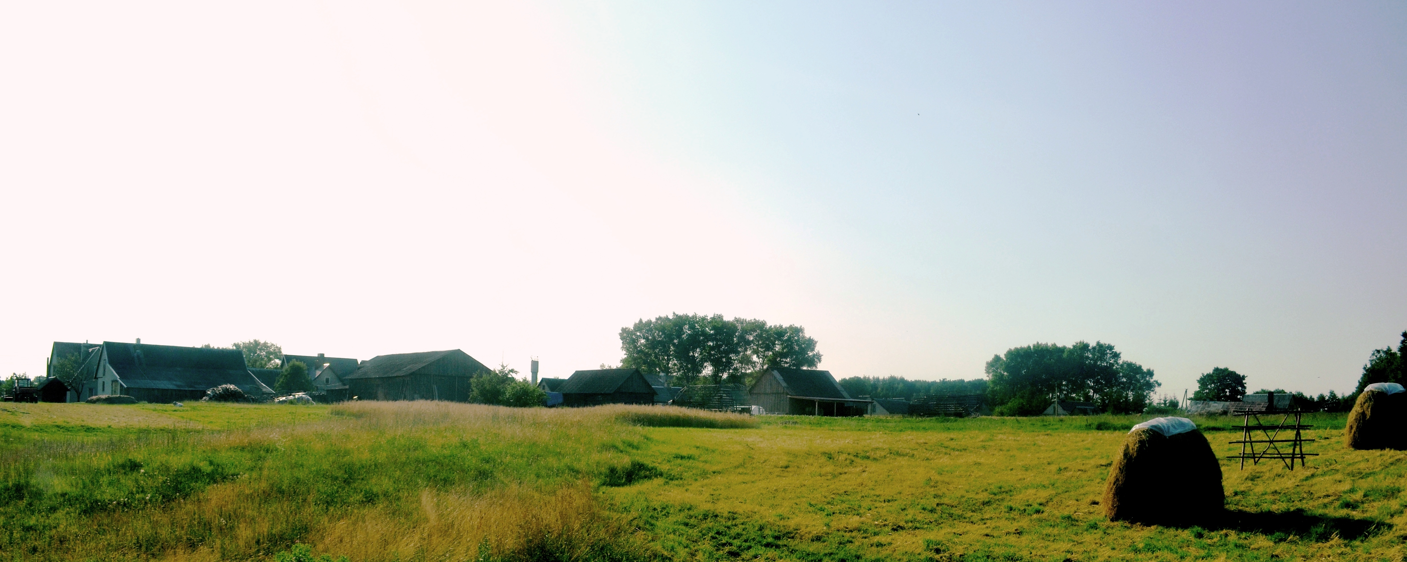 Lapelės, Širvintų raj.